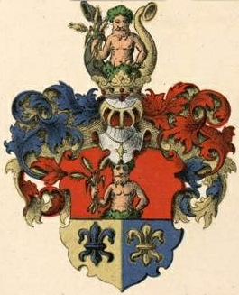 Wilckeni (Vaimõisa) suguvõsa aadlivapp